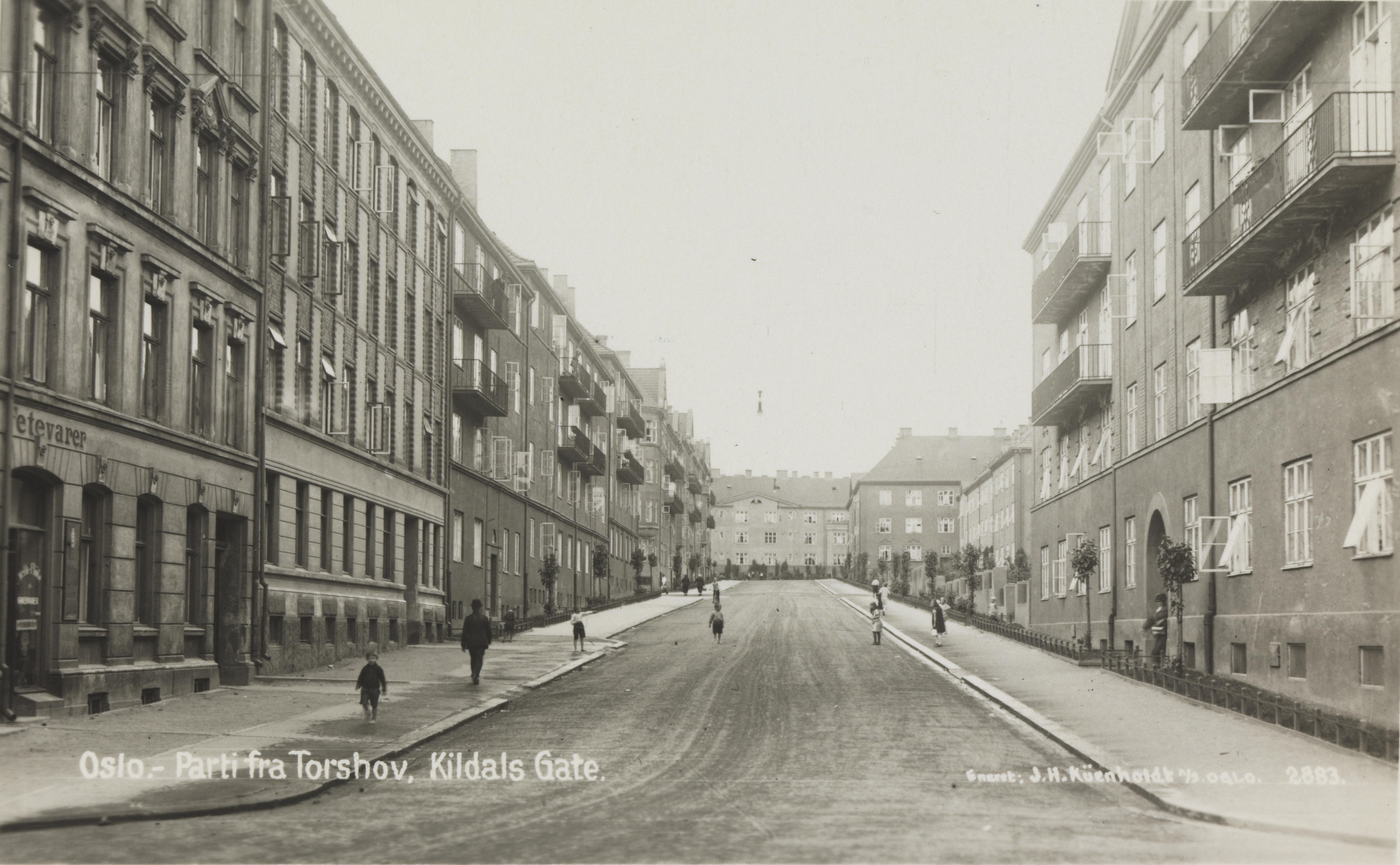 Bildet er hentet fra Nasjonalbibliotekets bildesamling Omsens gate,Torshov, Oslo, Oslo